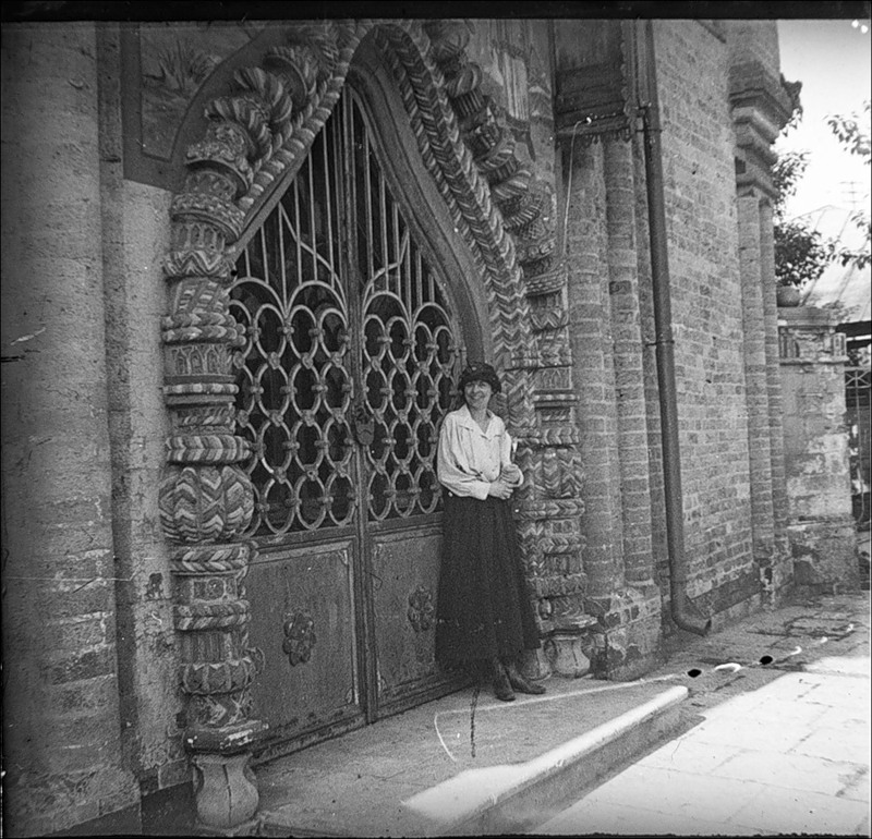 Фигурный портал церкви Космы и Дамиана в Нижних Садовниках. Оцифровано со стеклянного позитива. снесена в 1932 году.